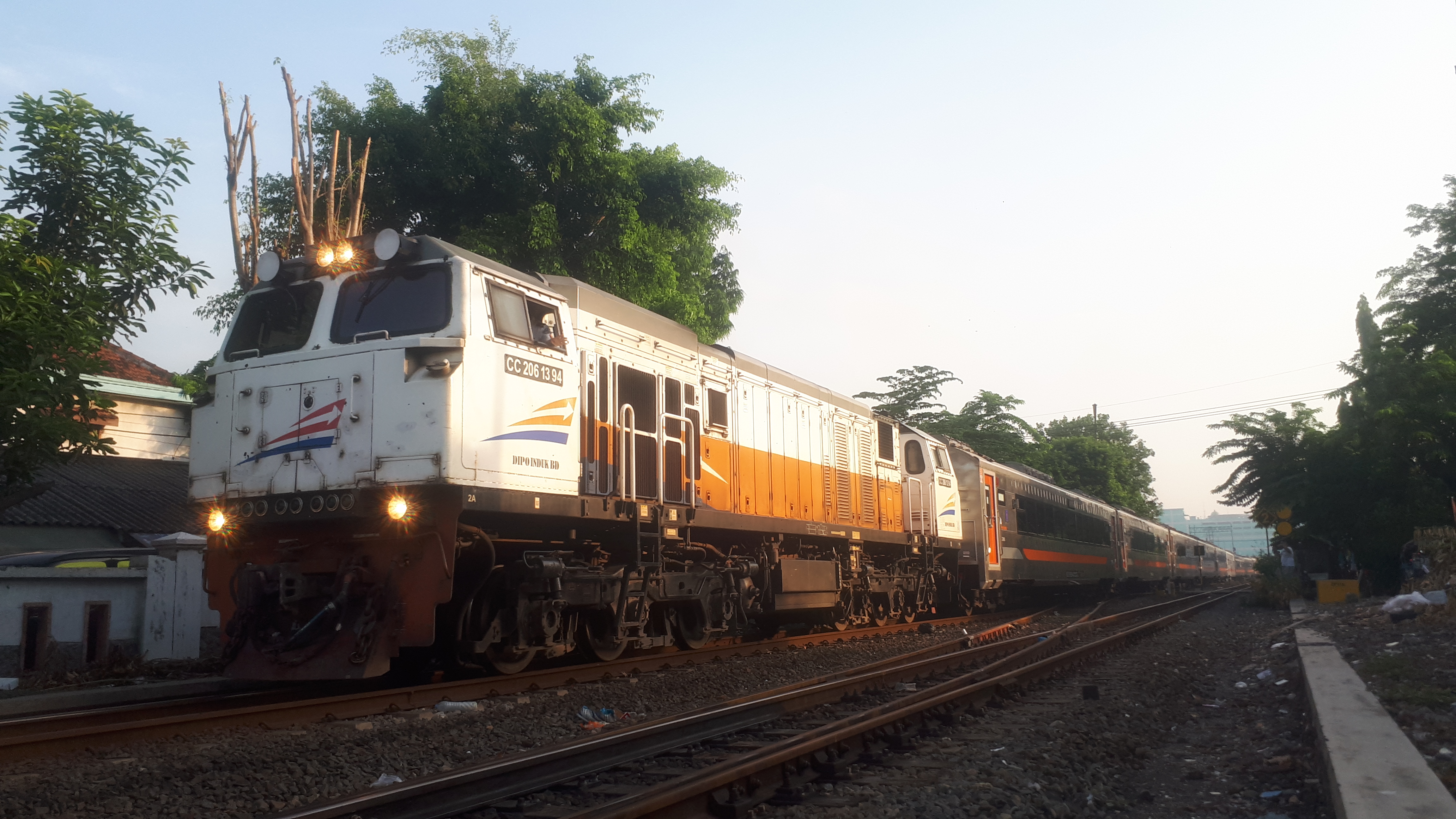 KA Maharani meninggalkan Stasiun Surabaya Pasarturi